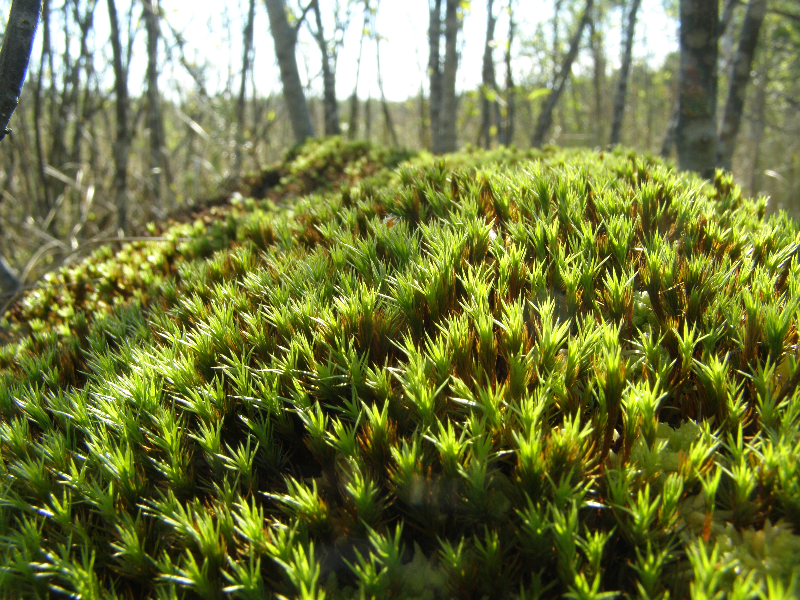 Хвощове болото, Коростенський р-н, ДП «Коростенське ЛМГ», Бехівське л-во, кв. 123, вид. 2; кв. 116, вид. 19